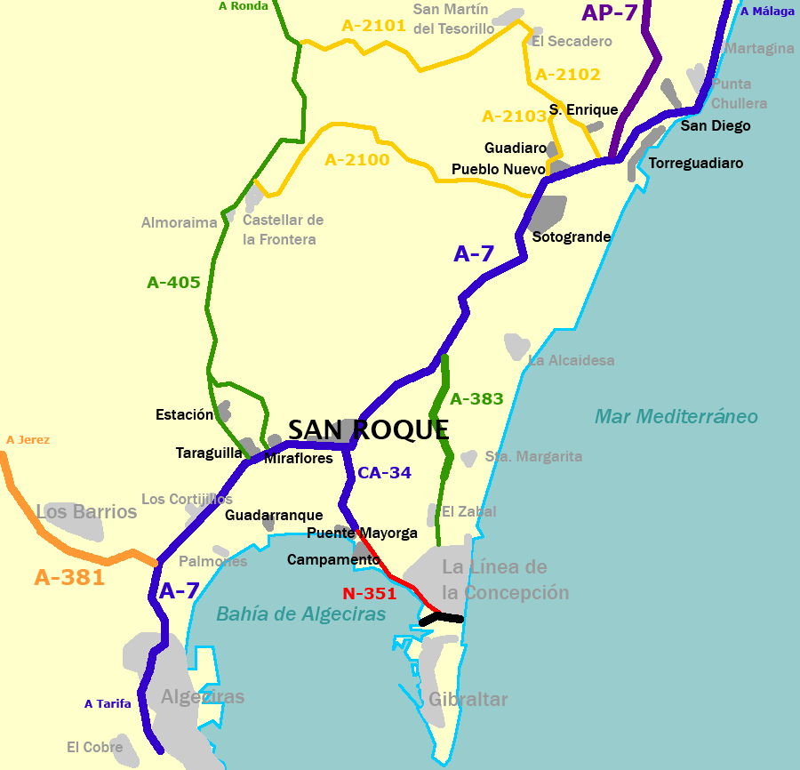 Situación de San Roque, sus comunicaciones y todas sus barriadas en un mapa zonal.